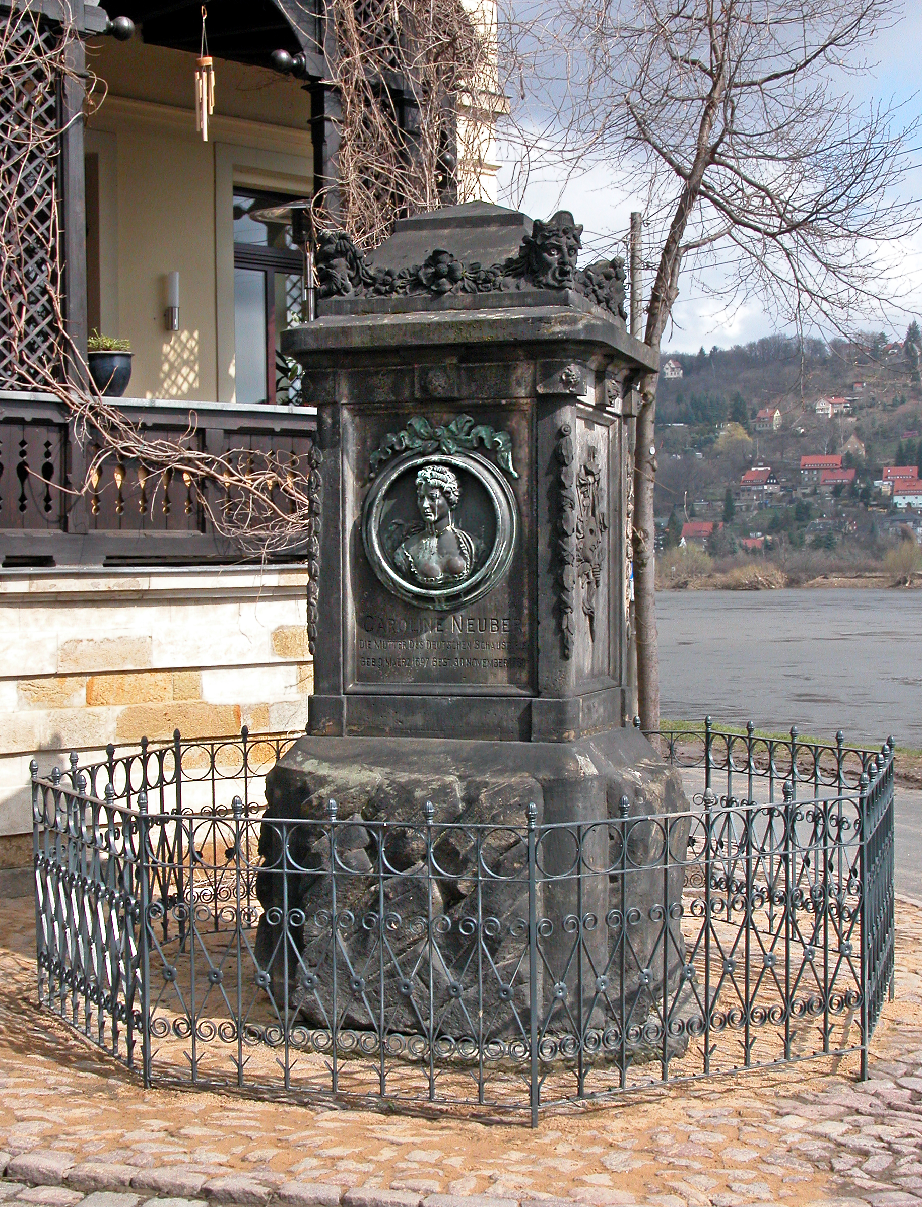 11.04.2006 01279 Dresden-Laubegast, Fährstraße / Laubegaster Ufer (GMP: 51.024532,13.840155). Denkmal für Friederike Caroline Neuber (09.03.1697 - 30.11.1760), genannt die Neuberin, Mutter des deutschen Schauspiels. 1730 trat sie erstmals in Dresden auf. 16 Jahre nach ihrem Tod (also 1776) ließ die Gemeinde Laubegast aus Spenden von Kunstfreunden und Verehrern der Muse ein Denkmal aus Sandstein erbauen. Entworfen hat es Johann Christian Feige d.J. und Friedrich August Krubsacius. Das Bildnismedaillon ist aus Bronze. [DSCN9412.TIF]20060411040.JPG(c)Blobelt